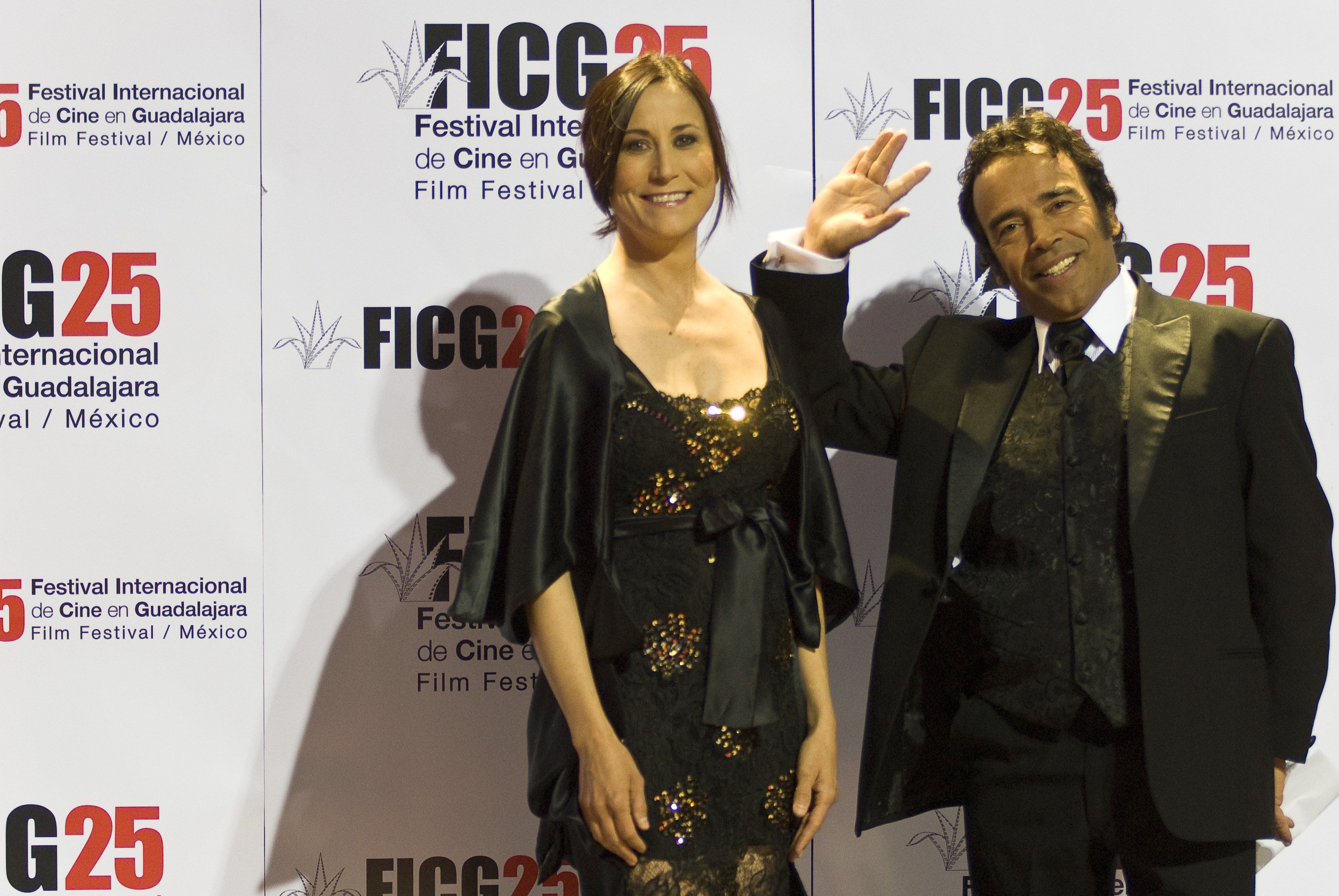 12.03.10 Lumi Cavazos ( Izquierda) y Damián Alcazar ( Derecha) posando en el Foto wall de la Alfombra Roja de la Gala de Inauguración, en el marco de actividades del Festival Internacional de Cine de Guadalajara en su edición 25 . 12 de Marzo, 2010. Guadalajara, México. © Cortesía FICG25 / Gonzalo García Ramírez.